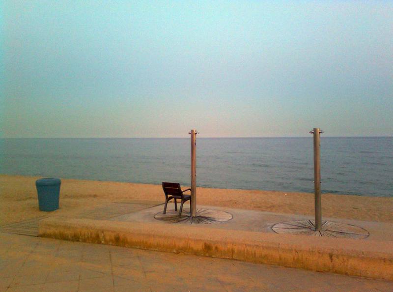 La Platja de la Barca Maria